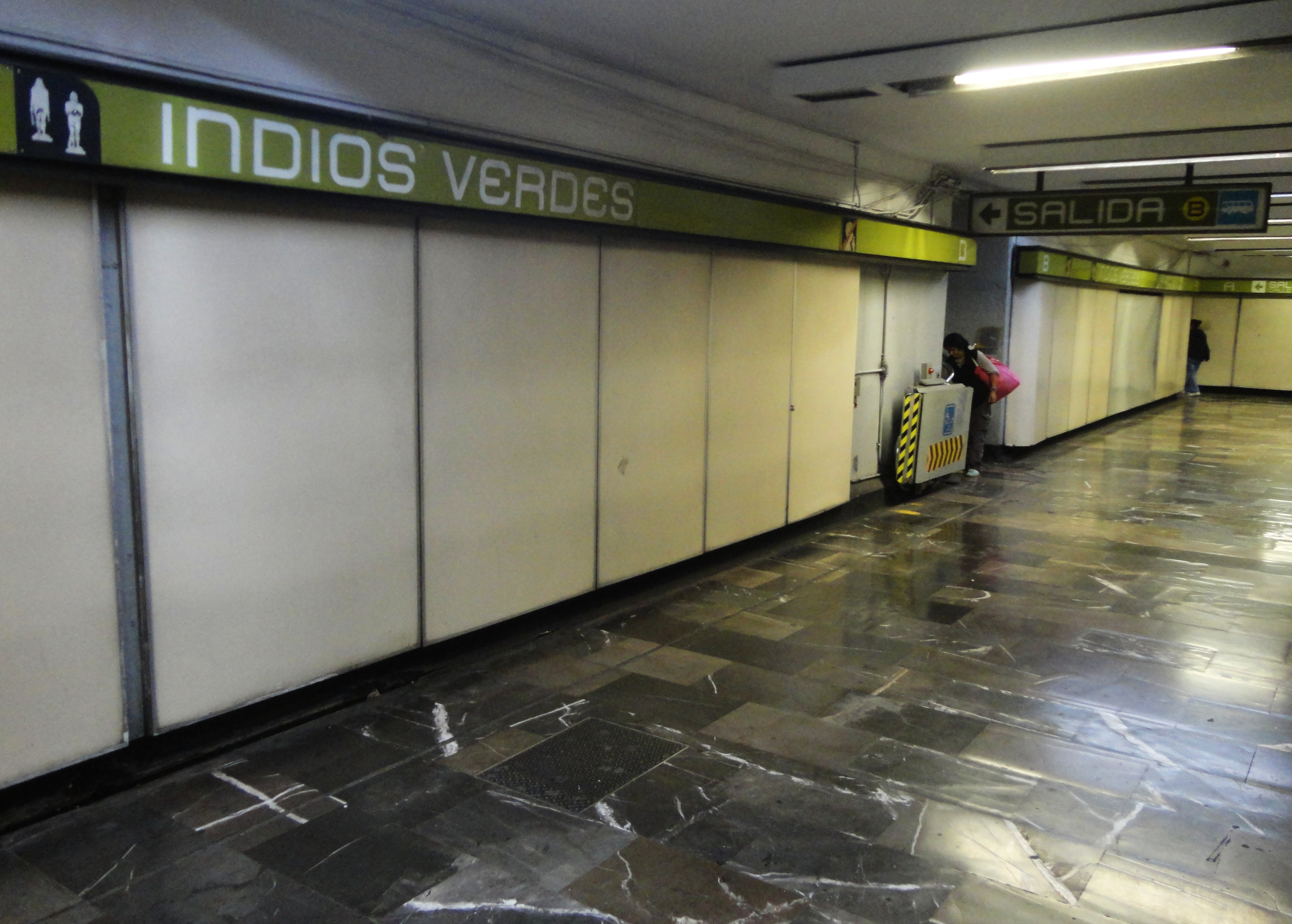 Estación Indios Verdes - Línea 3 - Metro de la Ciudad de México, CDMX.